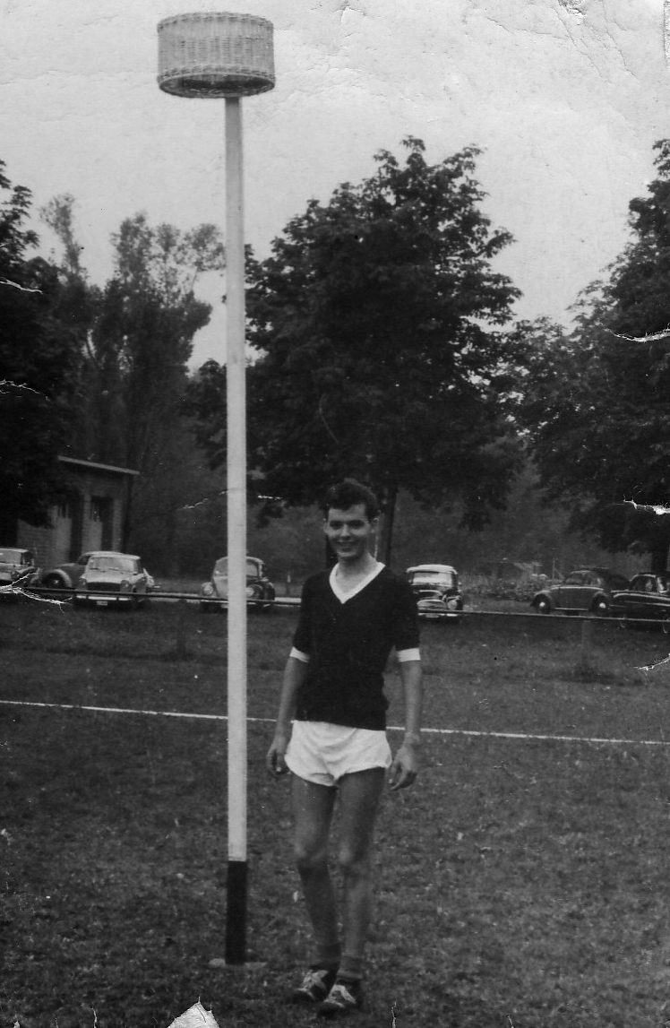 Schram PK-Prezidanto de SAT, ludanto de Korfpilkado. Persona foto de Schram, publikigita kun lia permeso.